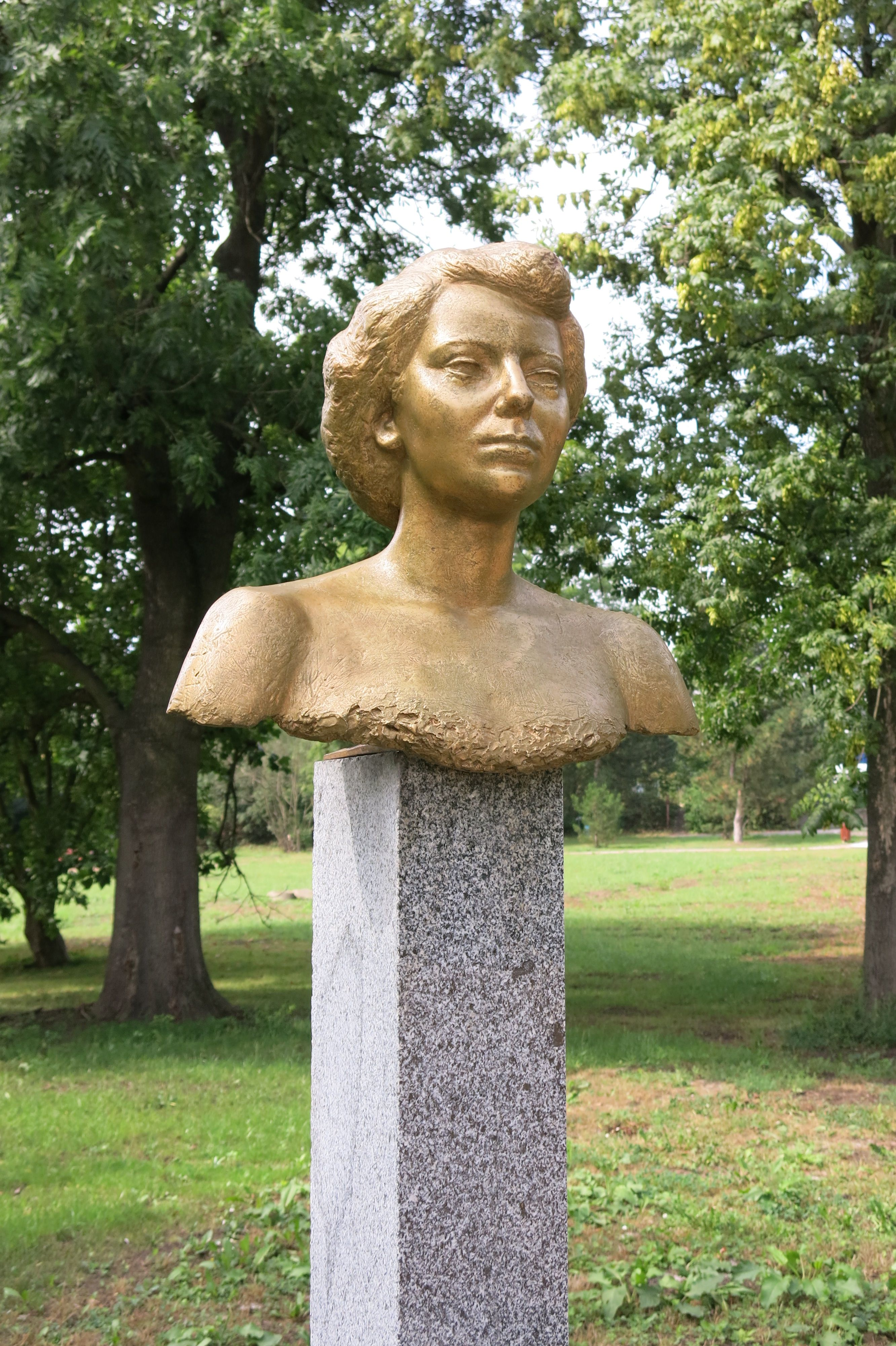 Pomník Herty Lindnerové, Bohosudov.